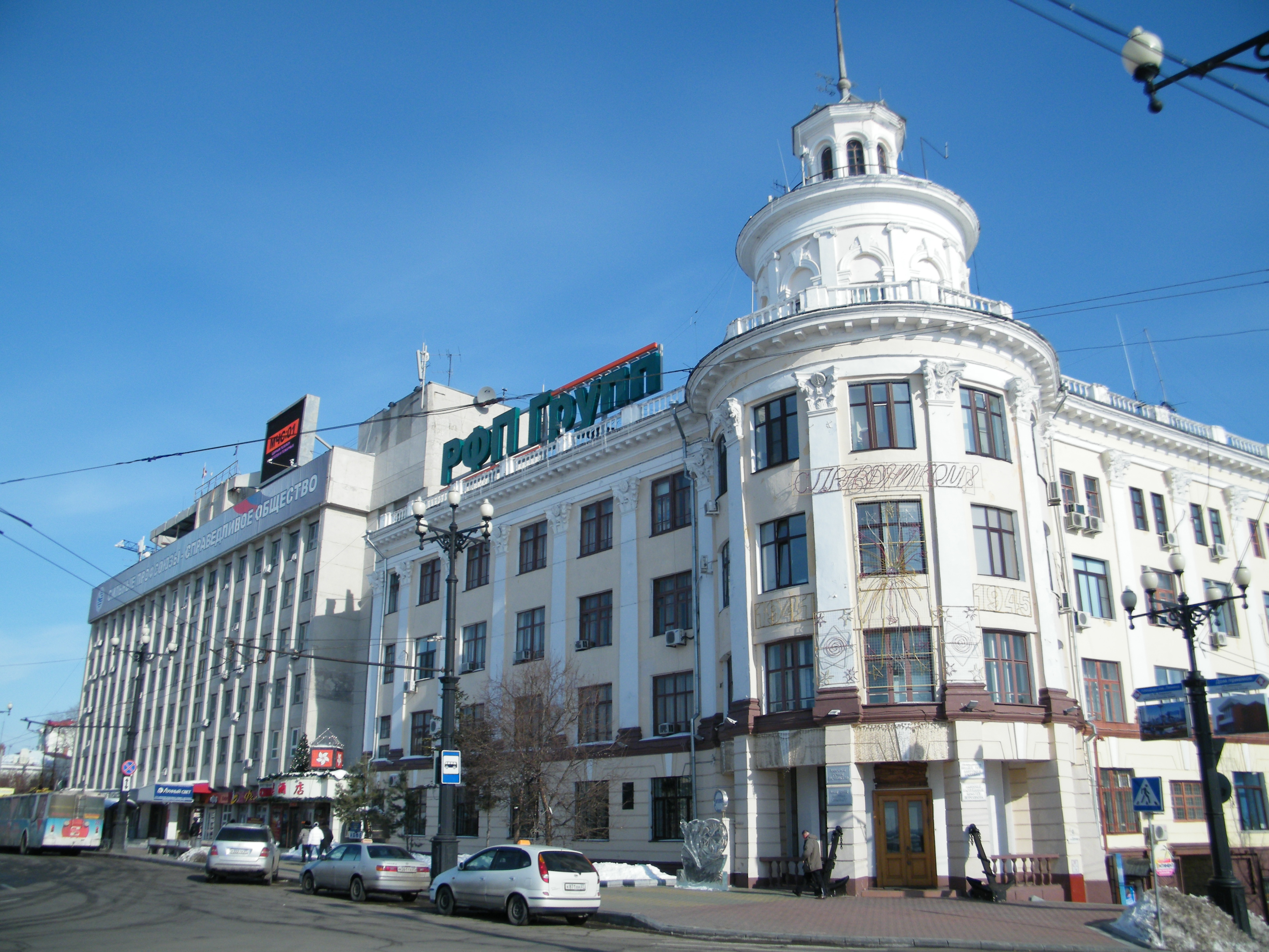 Хабаровск, Амурское речное пароходство